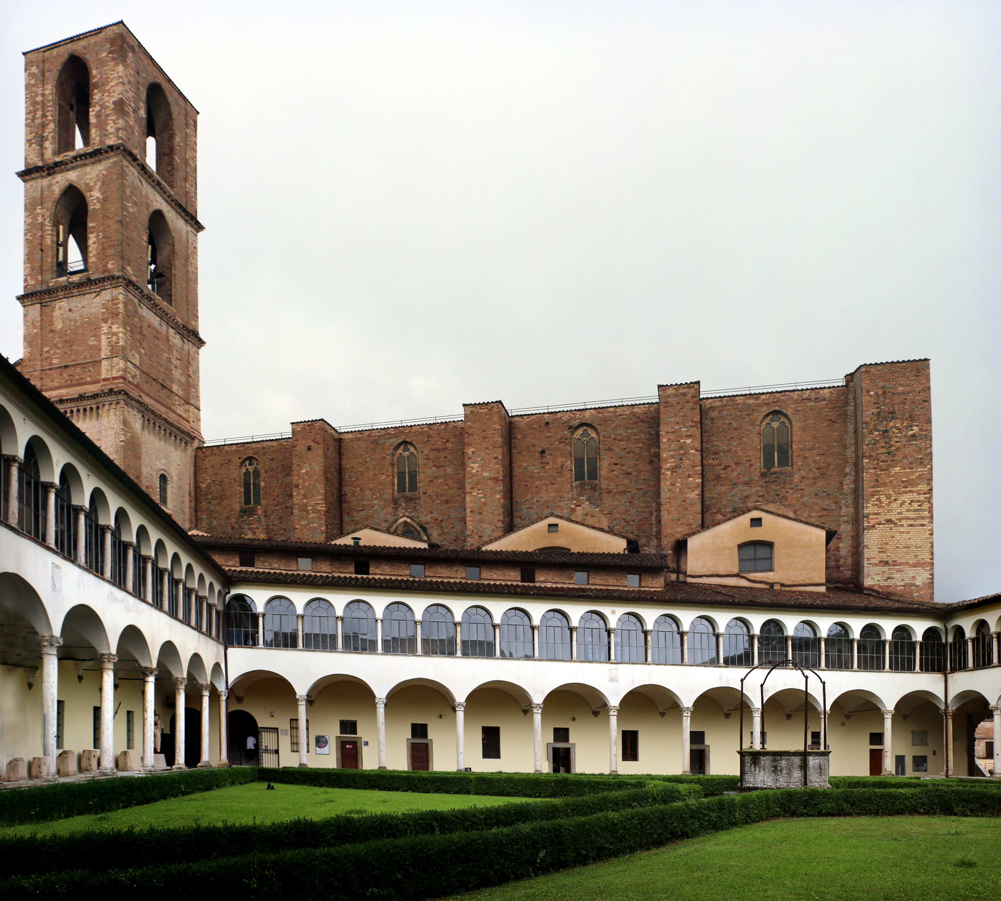 Museo Archeologico Nazionale dell'Umbria This is a photo of a monument which is part of cultural heritage of Italy.